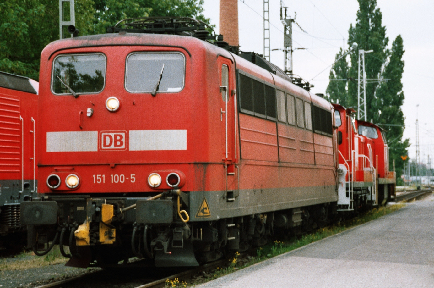 Lokomotive 151 100-5 in Nürnberg Bildquelle: Eigenes Foto vom 13. Mai 2004